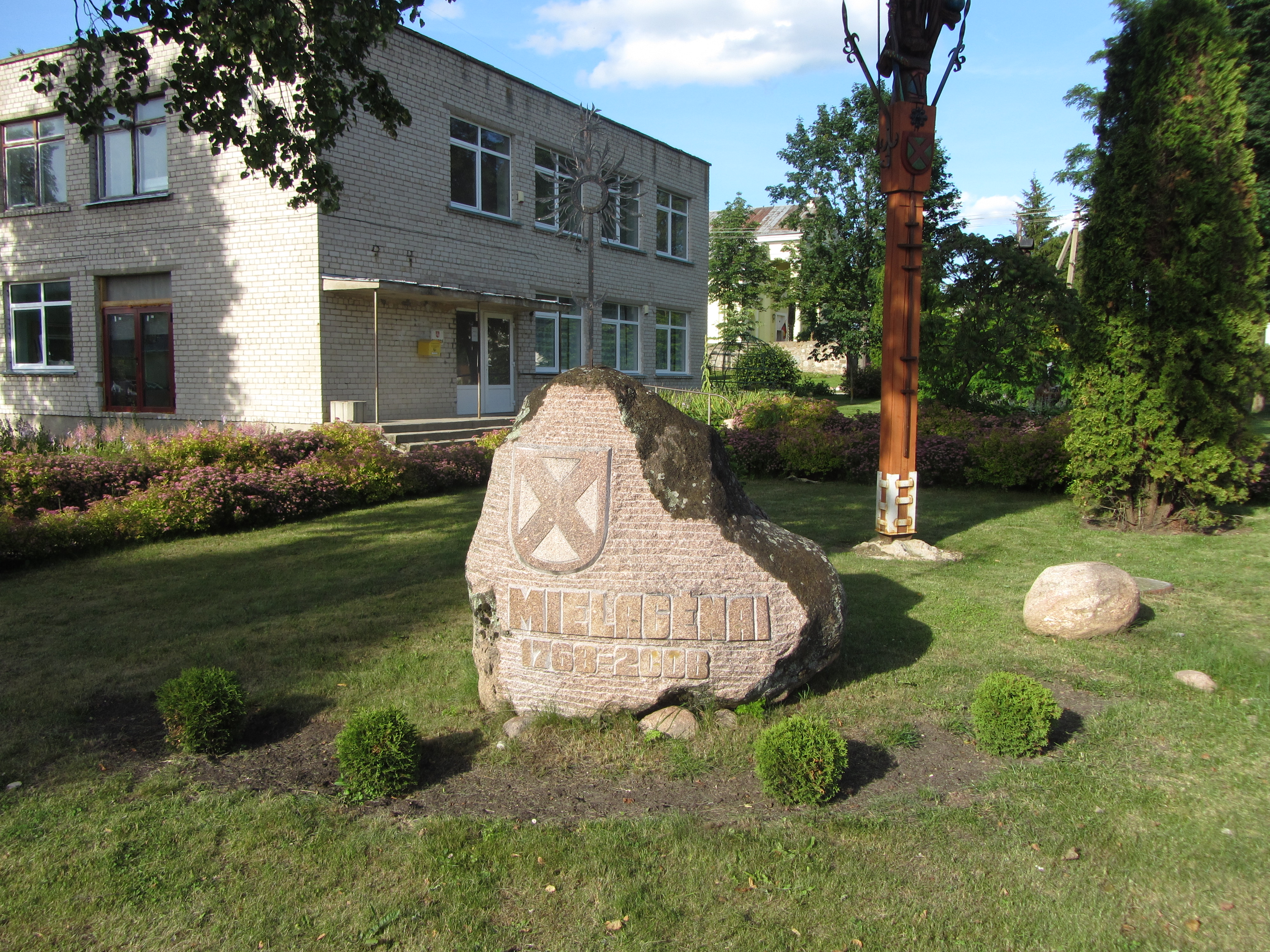 Mielagėnai, Lithuania